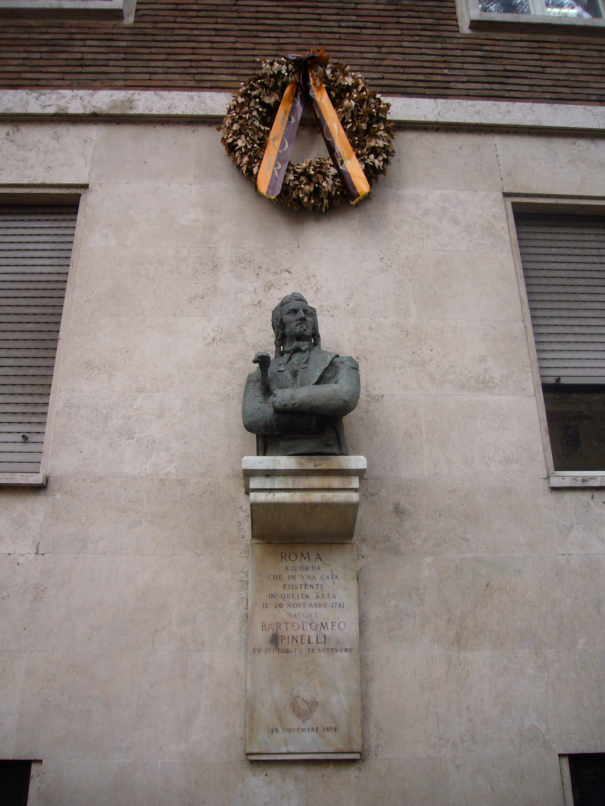 Roma, viale Trastevere: busto in memoria di Bartolomeo Pinelli sul luogo dove sorgeva la sua casa natale (1958)